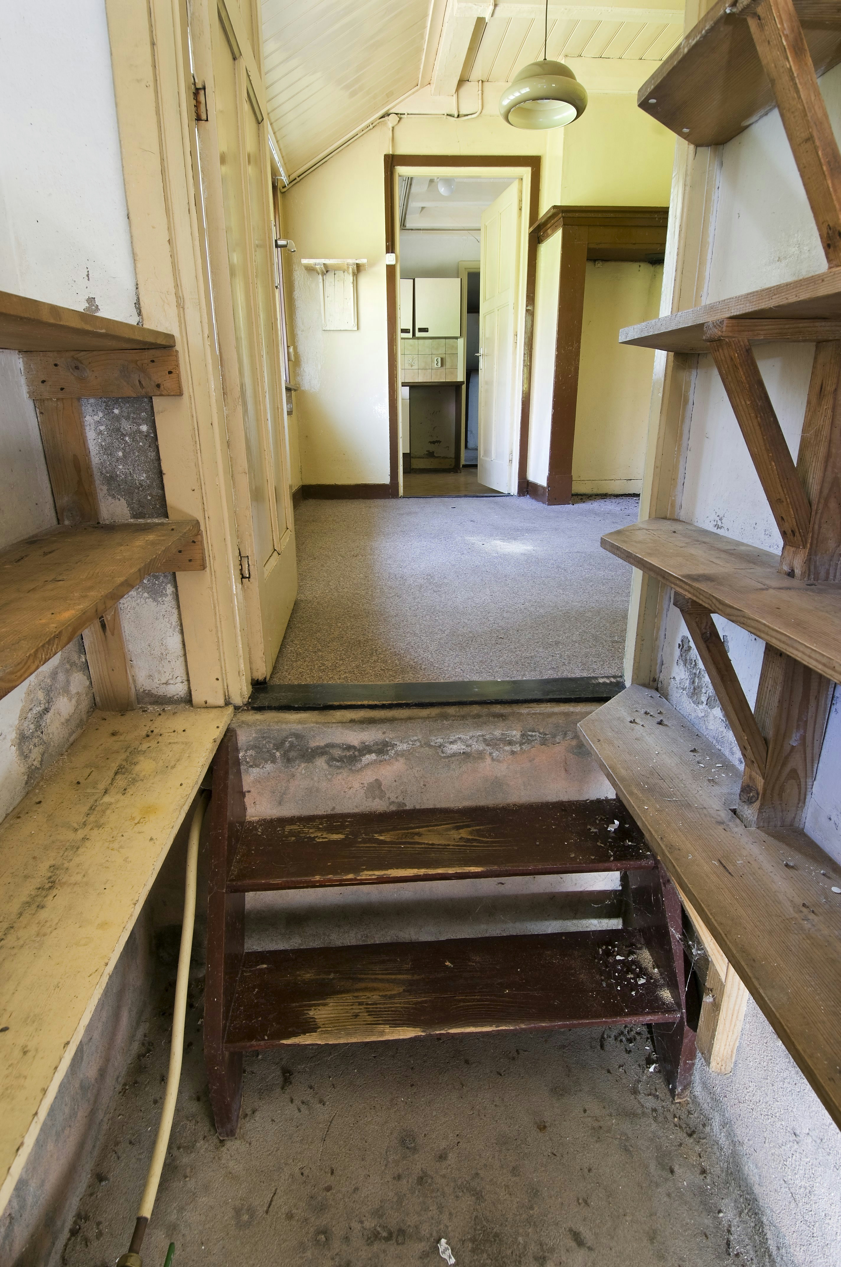 Koloniewoning: Interieur, zicht op de bijkeuken, gezien vanuit de provisie-kelderkast (opmerking: Koloniewoning van de Maatschappij van Weldadigheid)